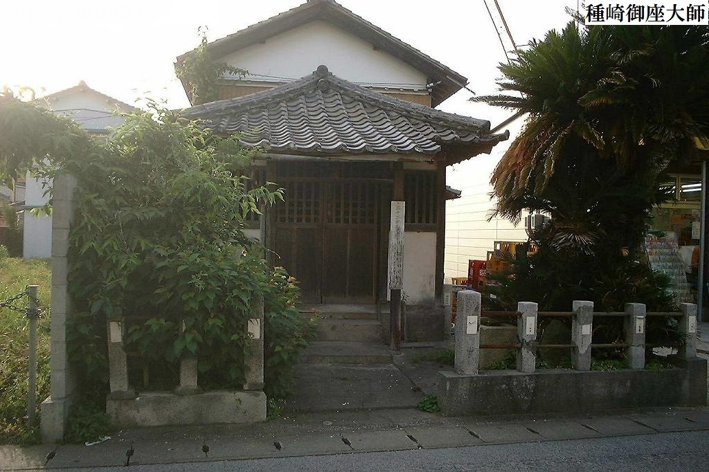 種崎の御座大師堂